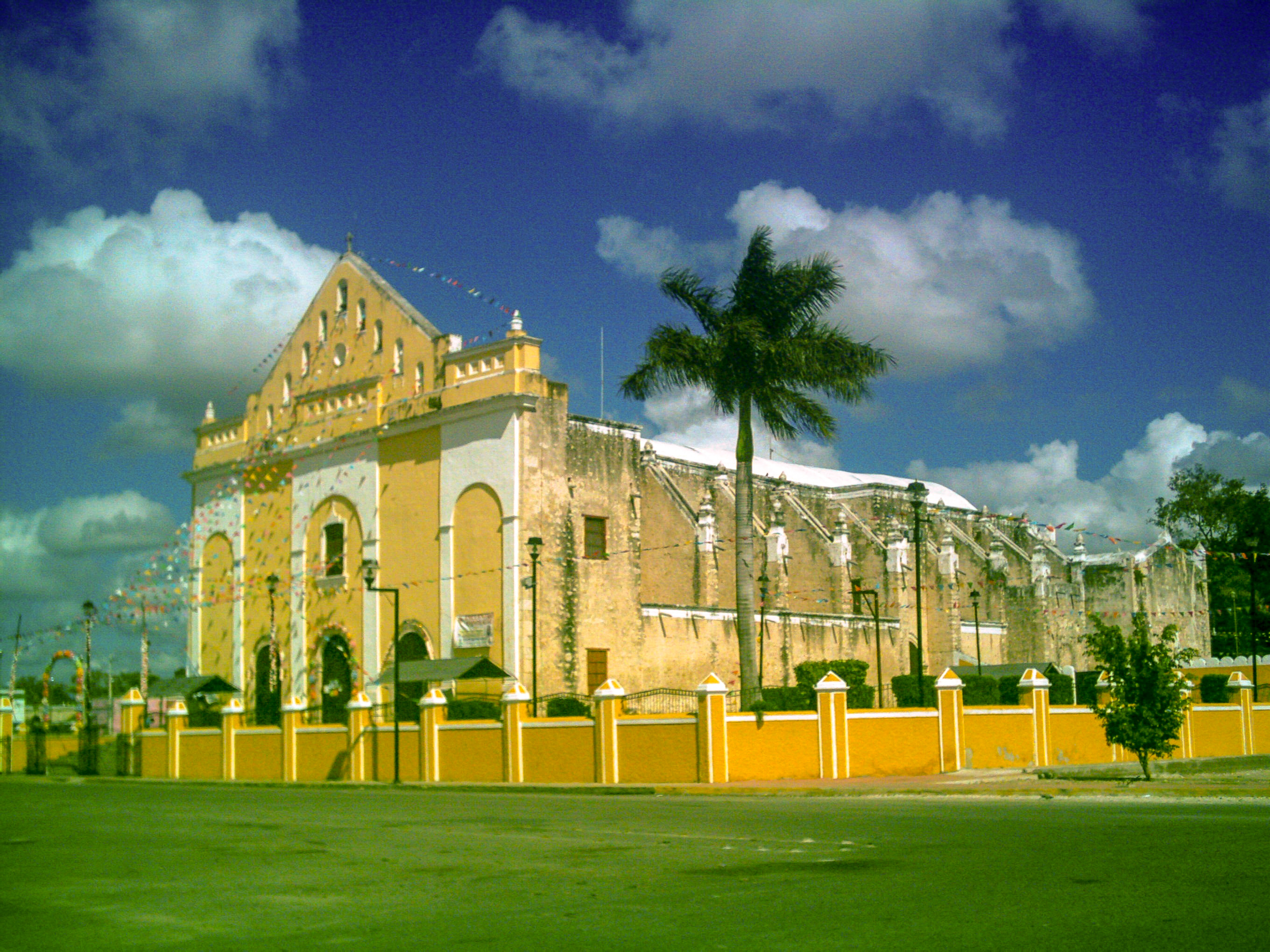 Iglesia de Hunucmá, Yucatán.